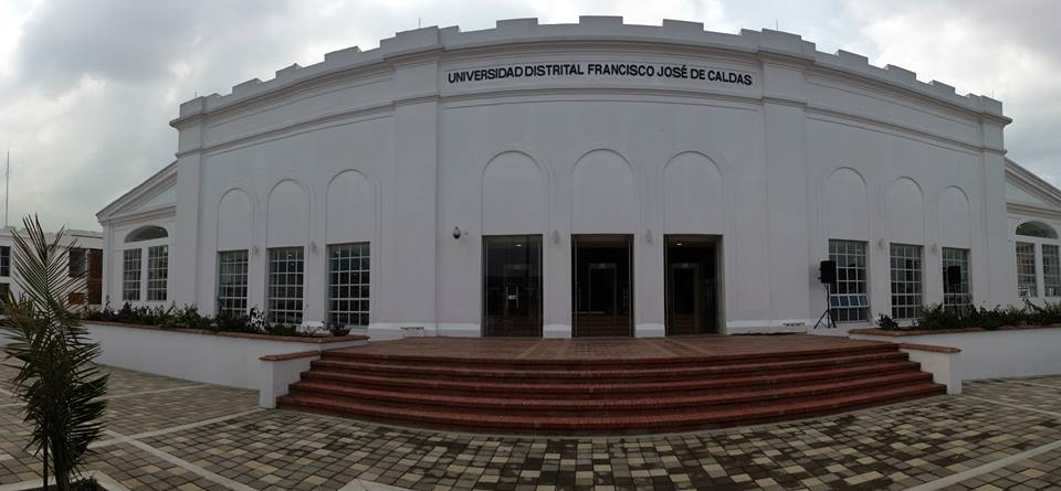 Fachada frontal biblioteca de la Universidad Distrital Francisco José de Caldas.